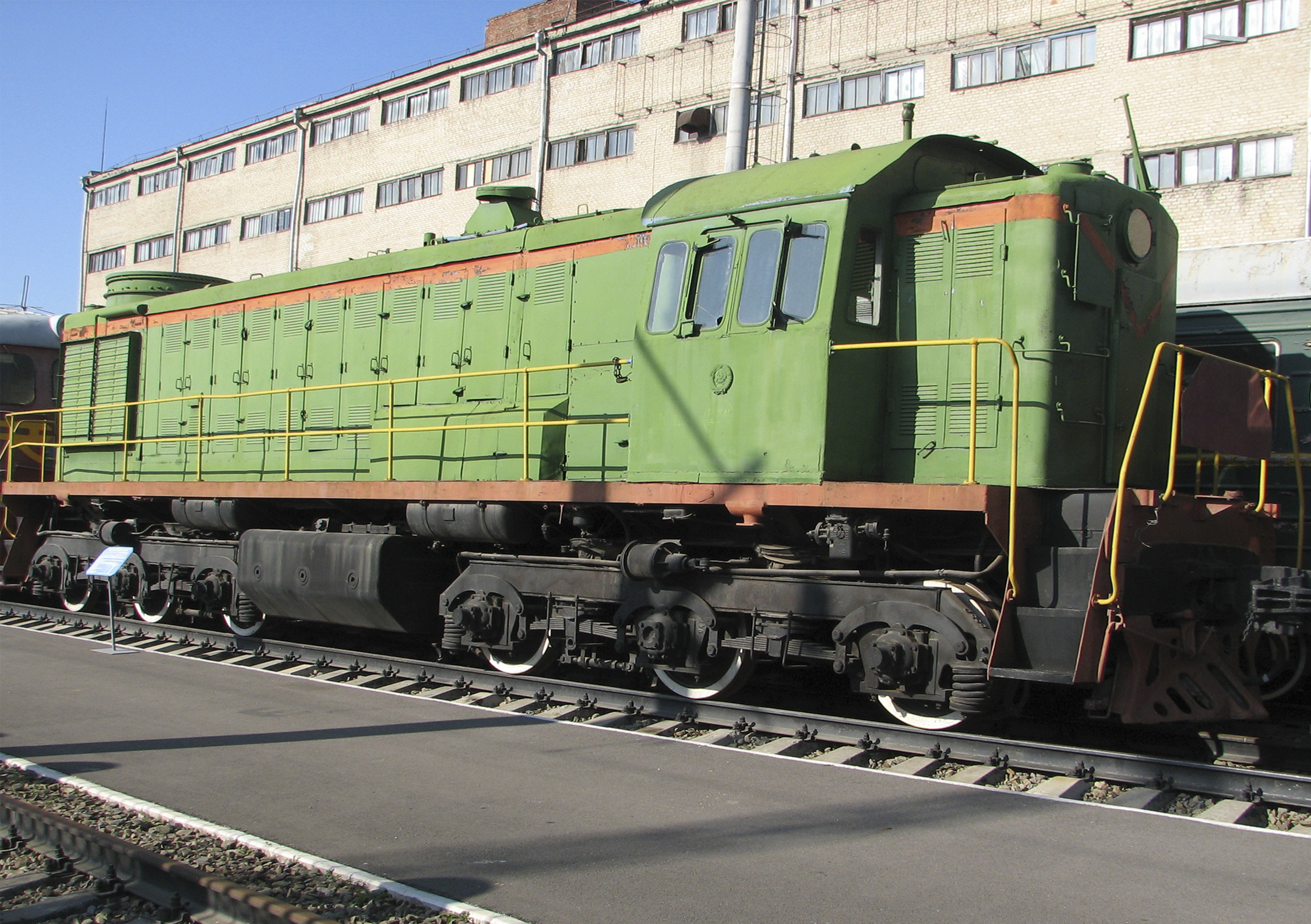 Тепловоз построен в 1958 году Брянским тепловозостроительным заводом